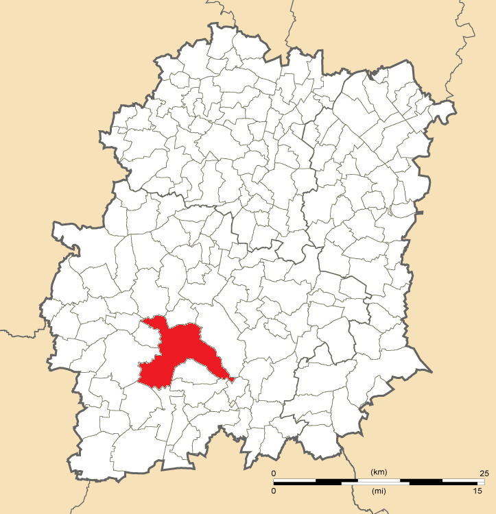 Carte de position d'Étampes en Essonne.